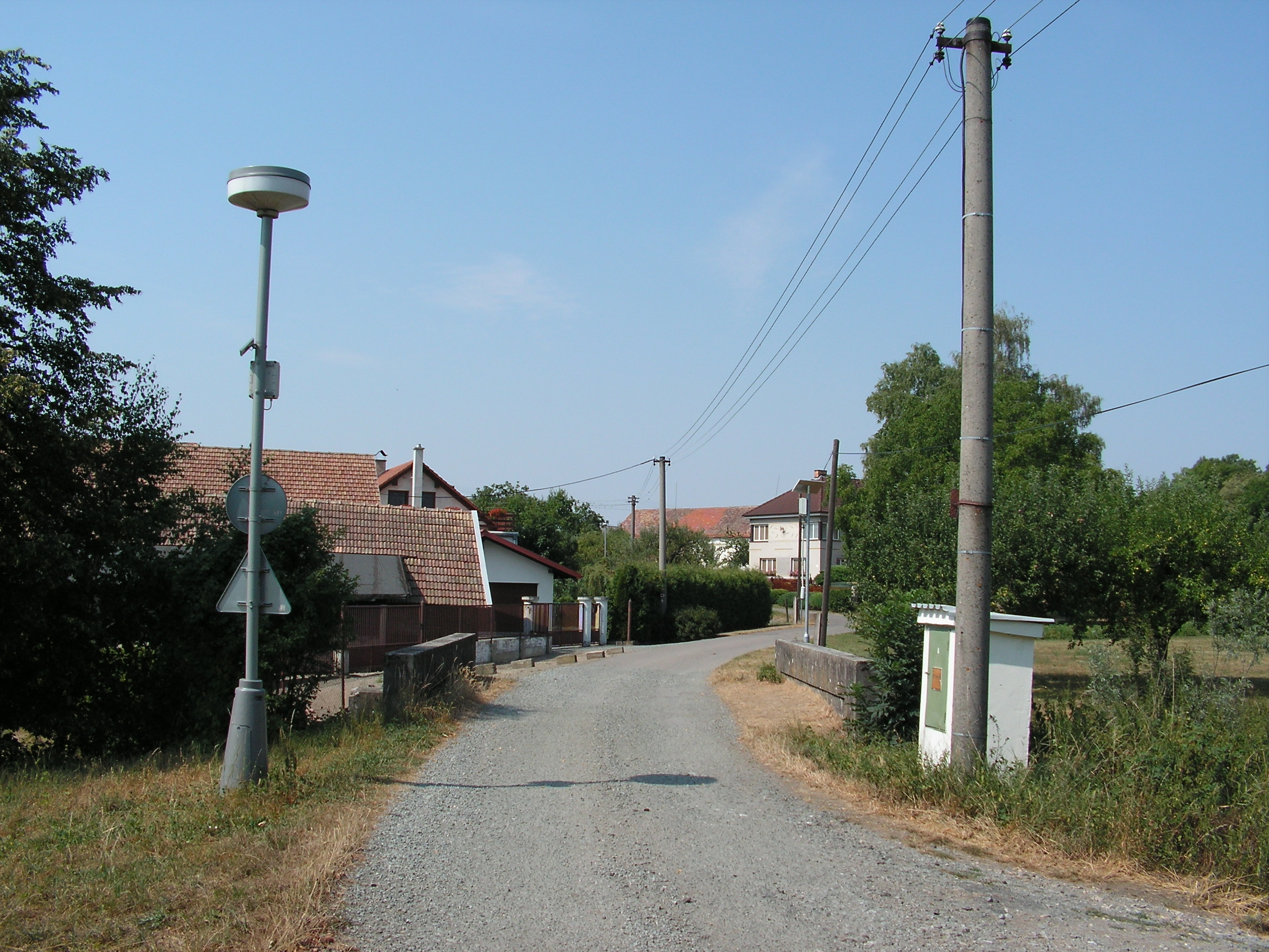 Pohled na obec od mostu přes Zlatý potok u domu čp. 104